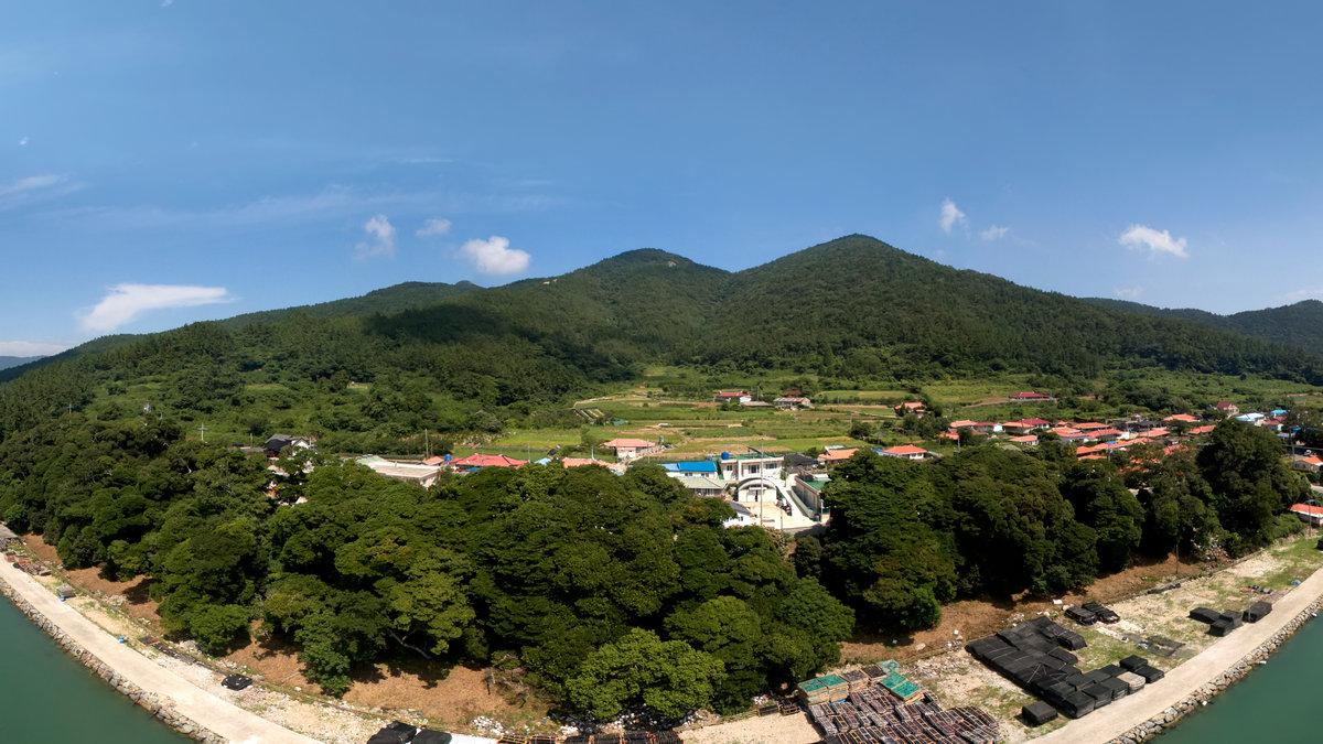 대한민국 천연기념물 제340호 완도 맹선리 상록수림